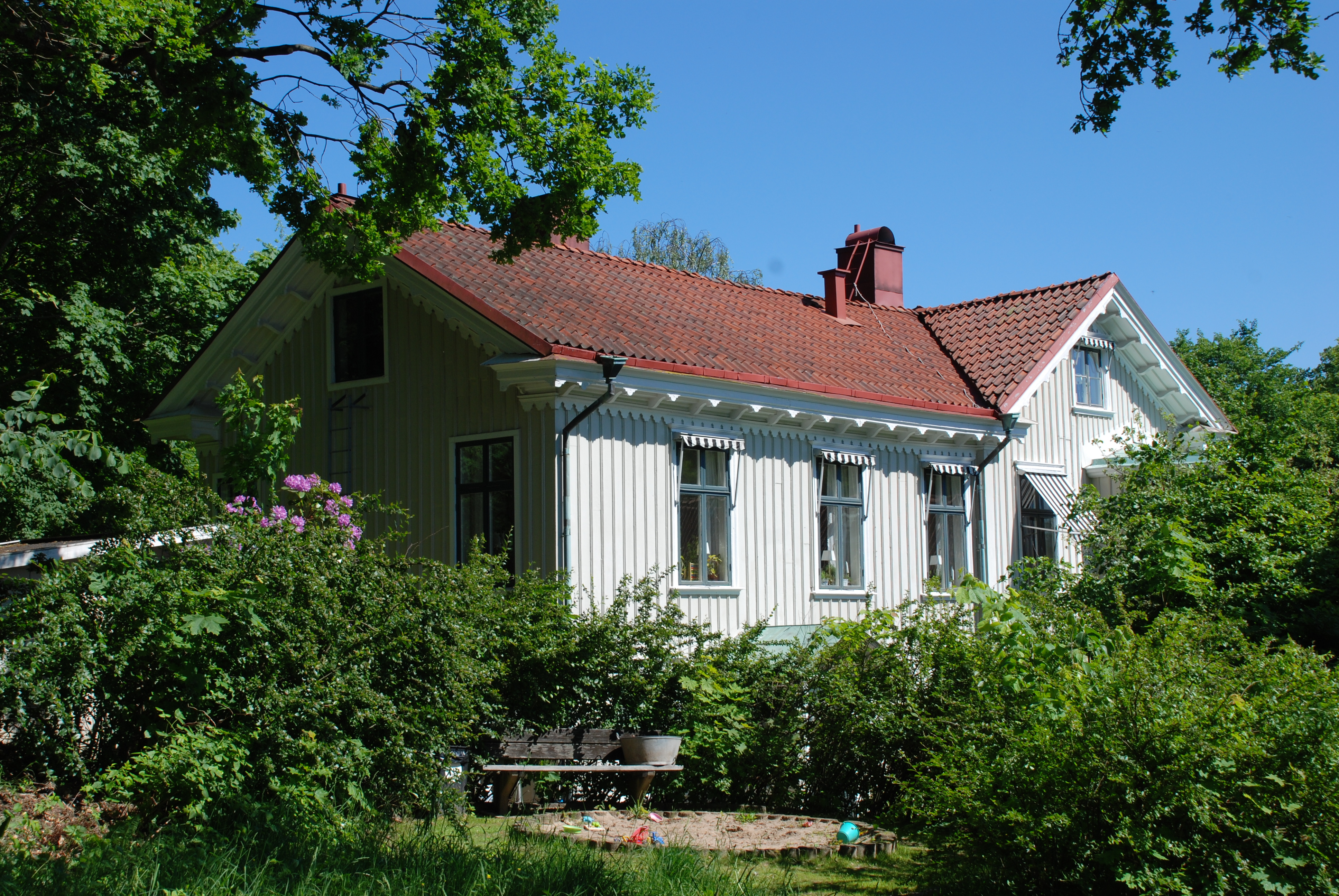 Stora Gårda herrgård i stadsdelen Bö i Göteborg.